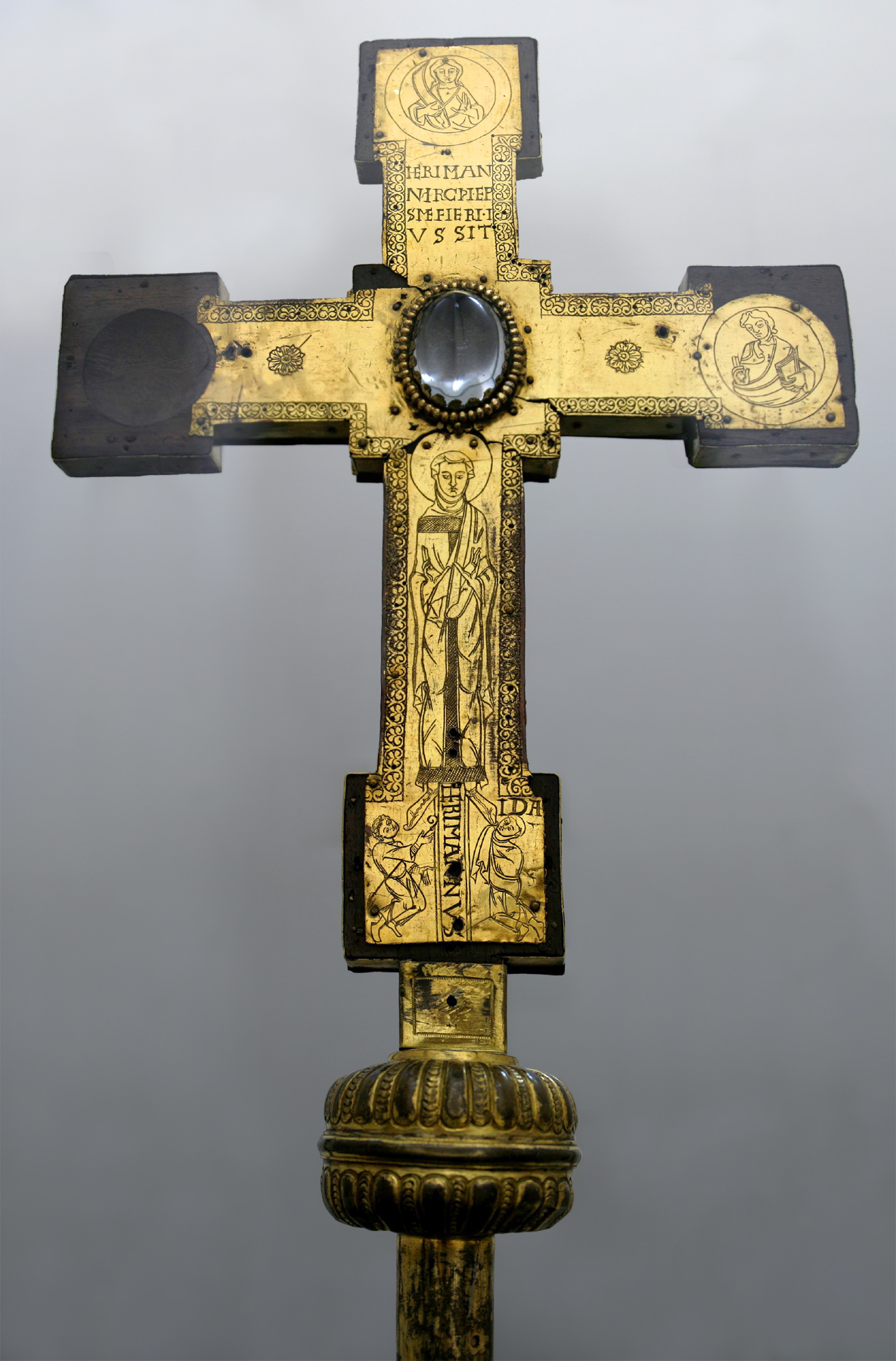 Hermann-Ida-Kreuz im Kölner Diözesanmuseum (Kolumba), Rückseite